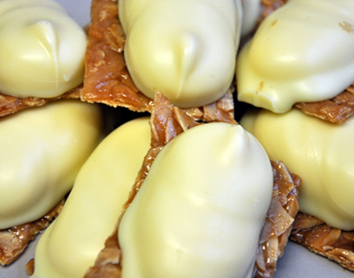 Zwevezeelse Florentientjes zijn pralines die geproduceerd worden bij Bakkerij Danny, in de Brugsesteenweg (Hille). Het is een witte praline gevuld met een botercréme op een gecarameliseerd amandelkoekje.